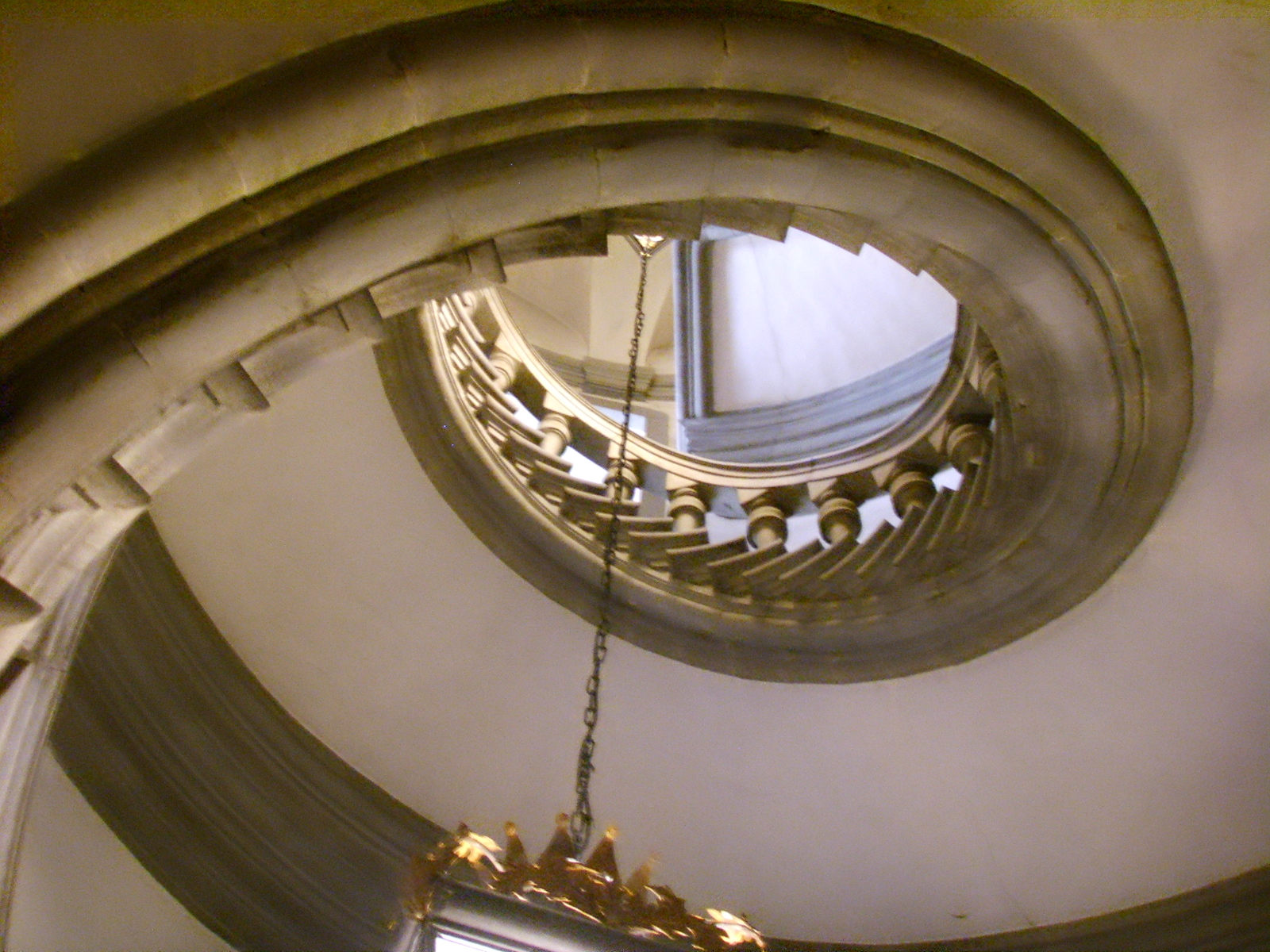 Palazzo corsini, scalinata elicoidale di Pierfrancesco Silvani